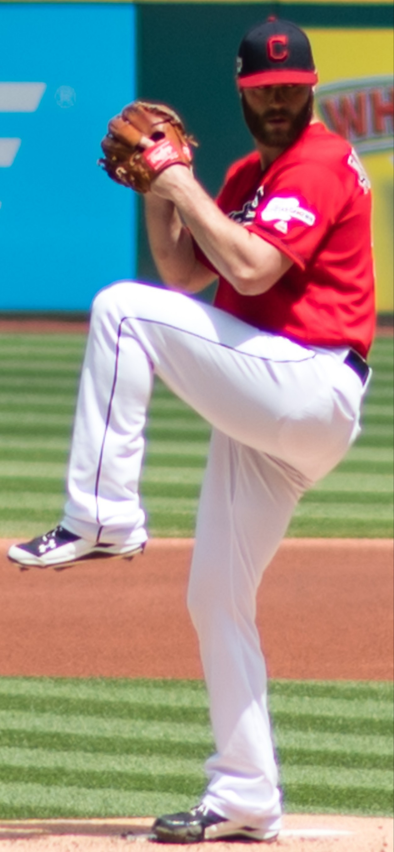 Seattle Mariners VS. Cleveland Indians